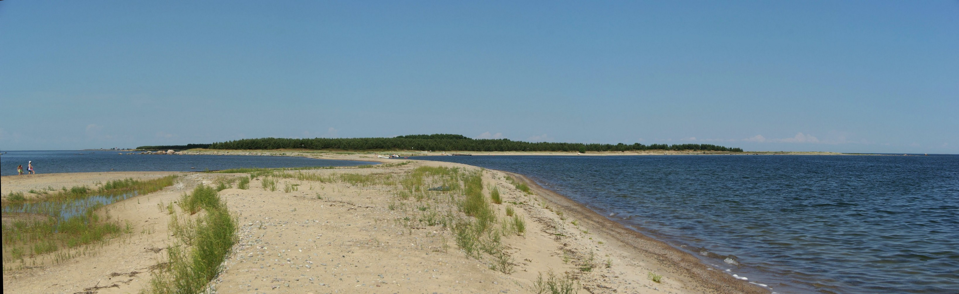 Koipsi(ka Koipse) saar asub Harju maakonnas Jõelähtme vallas Kaberneeme poolsaare otsast 1km põhja pool